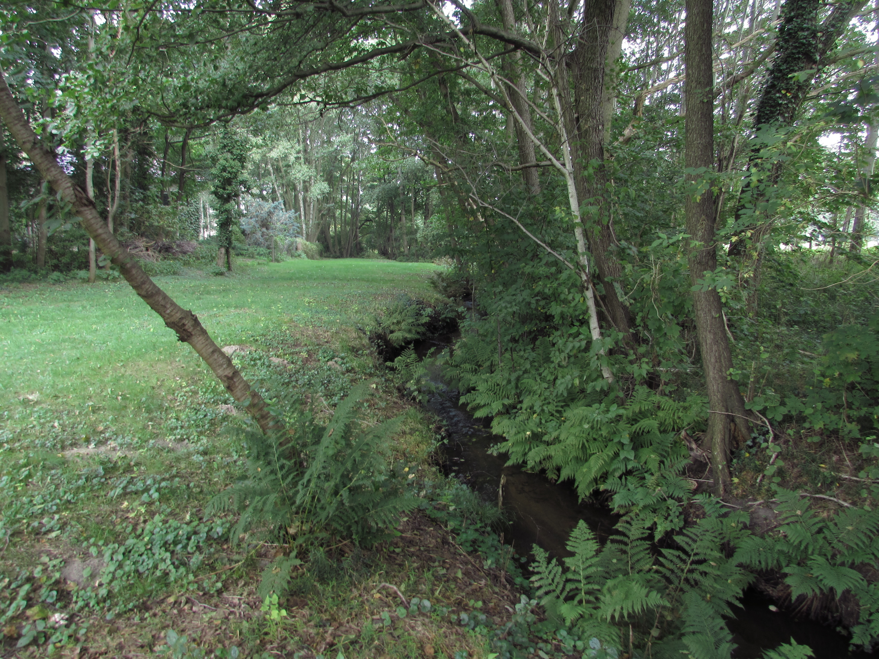 Der Krumme Bach bei Dorf Buckau